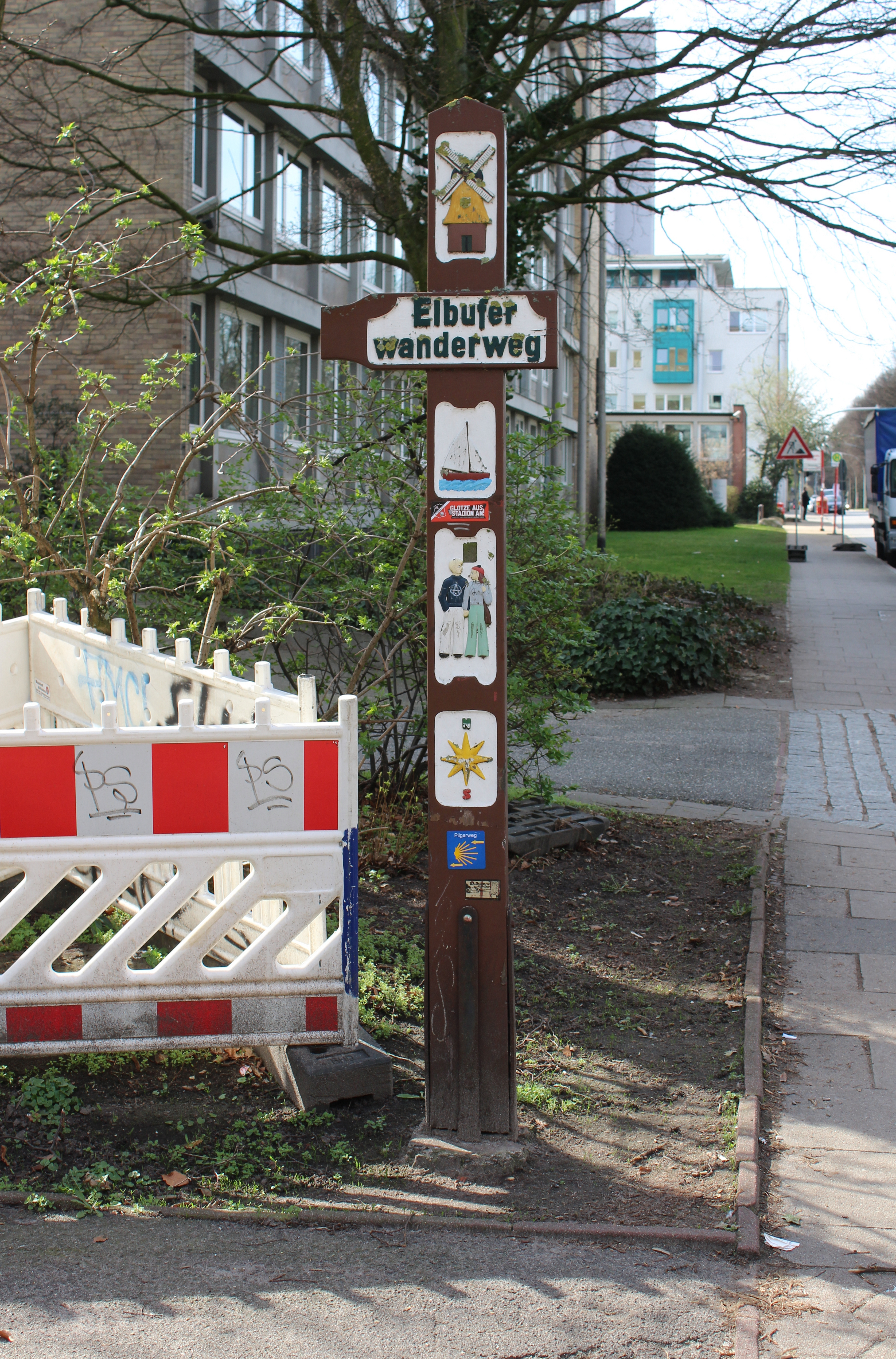 Schild für den Elbuferwanderweg an der Palmaille in Hamburg-Altona-Altstadt.